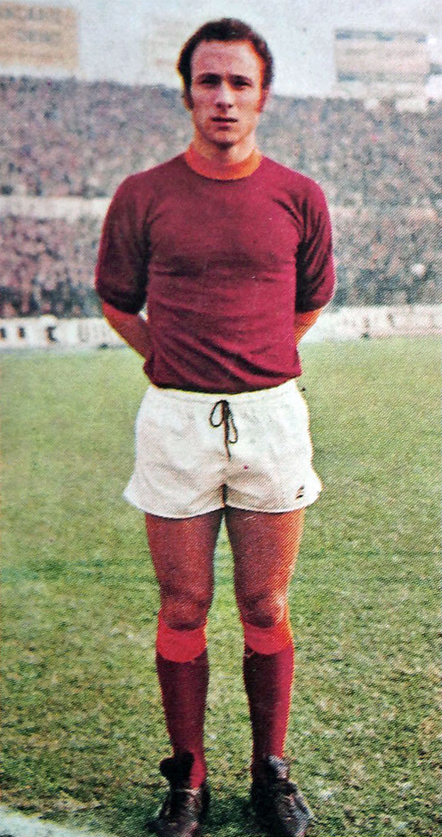 Il calciatore italiano Francesco Rocca alla Roma all'inizio della stagione 1974-75.